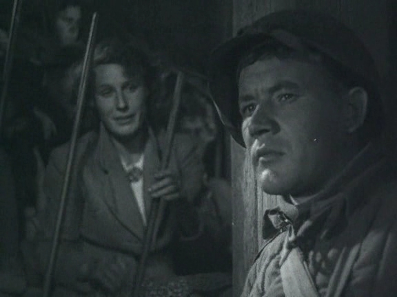 Acteur soviétique Boris Andreïev dans le film "Deux combattants" (1943)